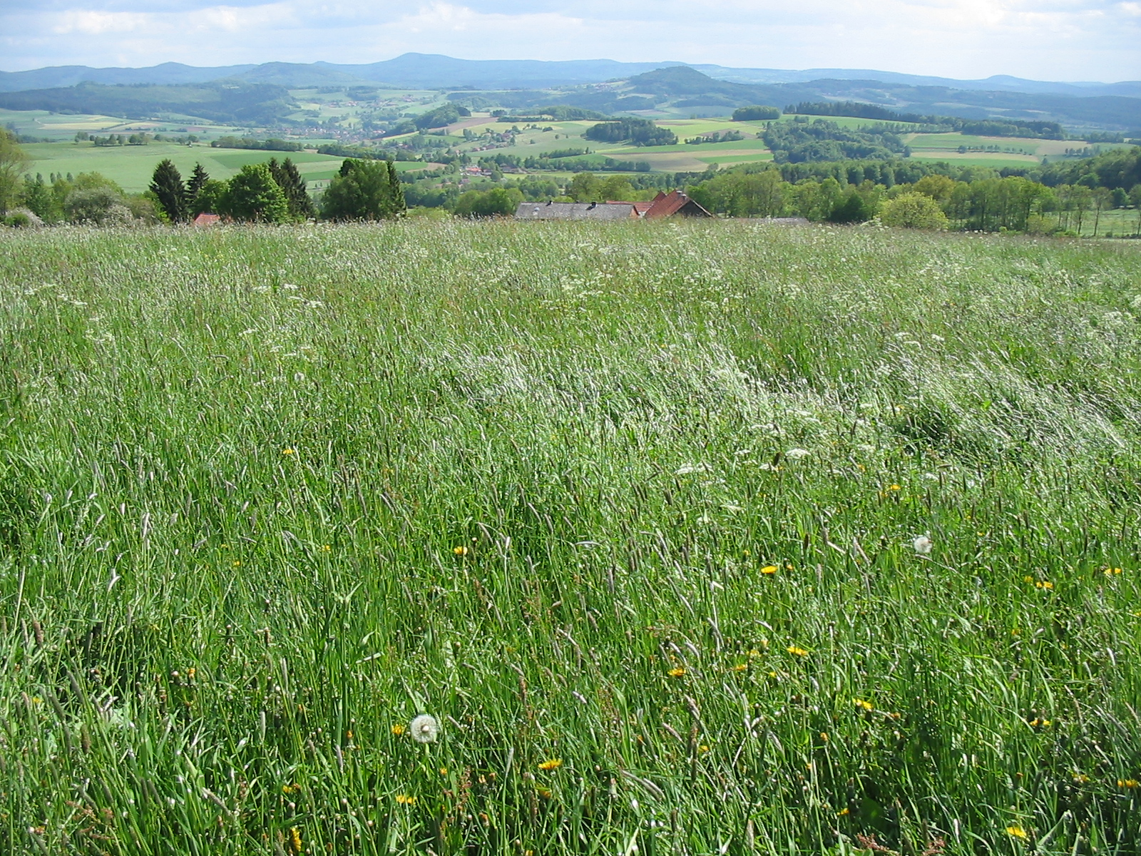 Hessische Rhön